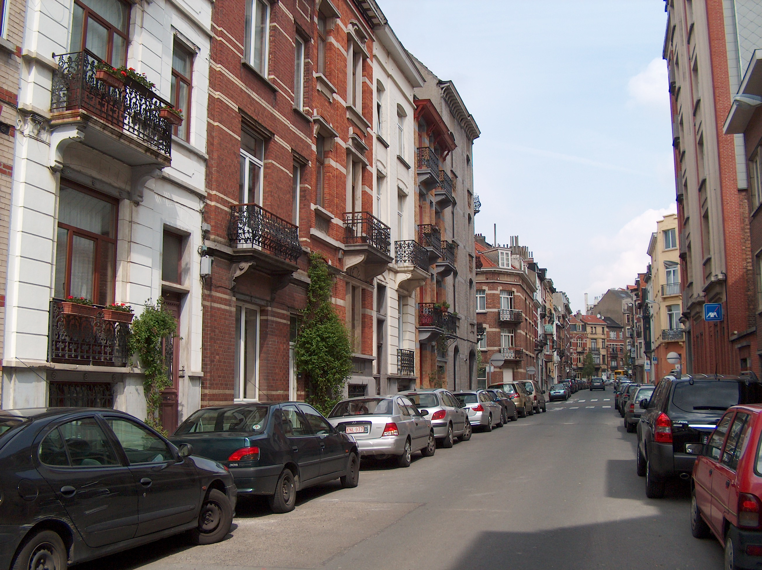 La rue Eugène Smits à Schaerbeek, Bruxelles, Belgique.